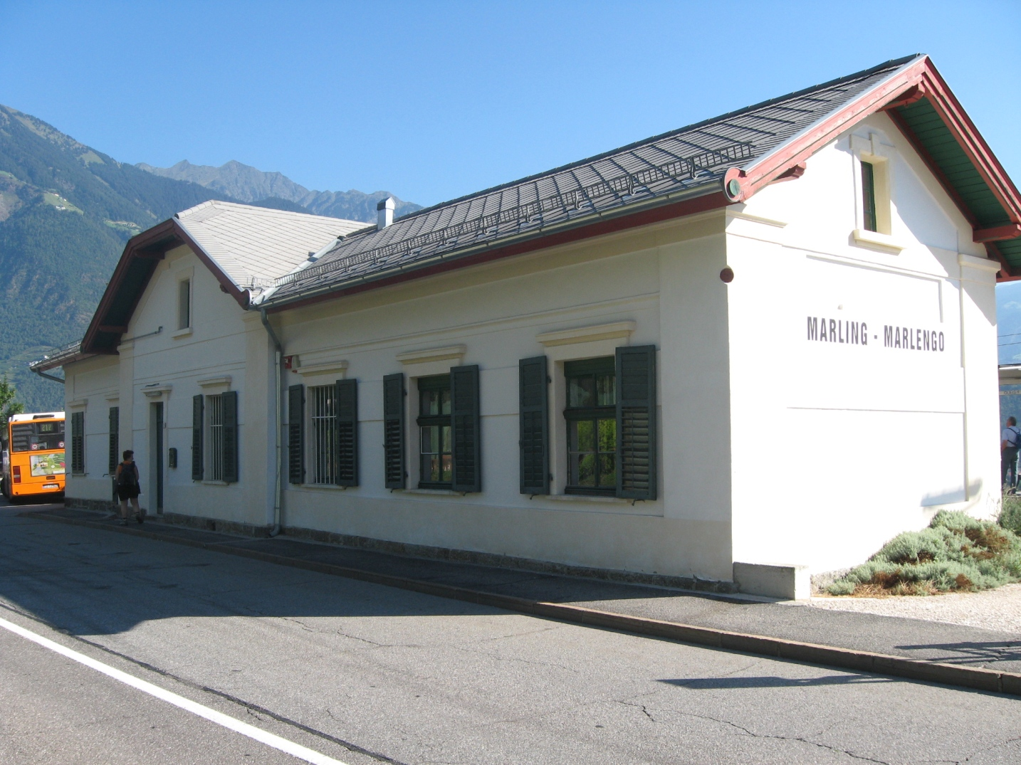 stazione di Marling - Marlengo. agosto 2012